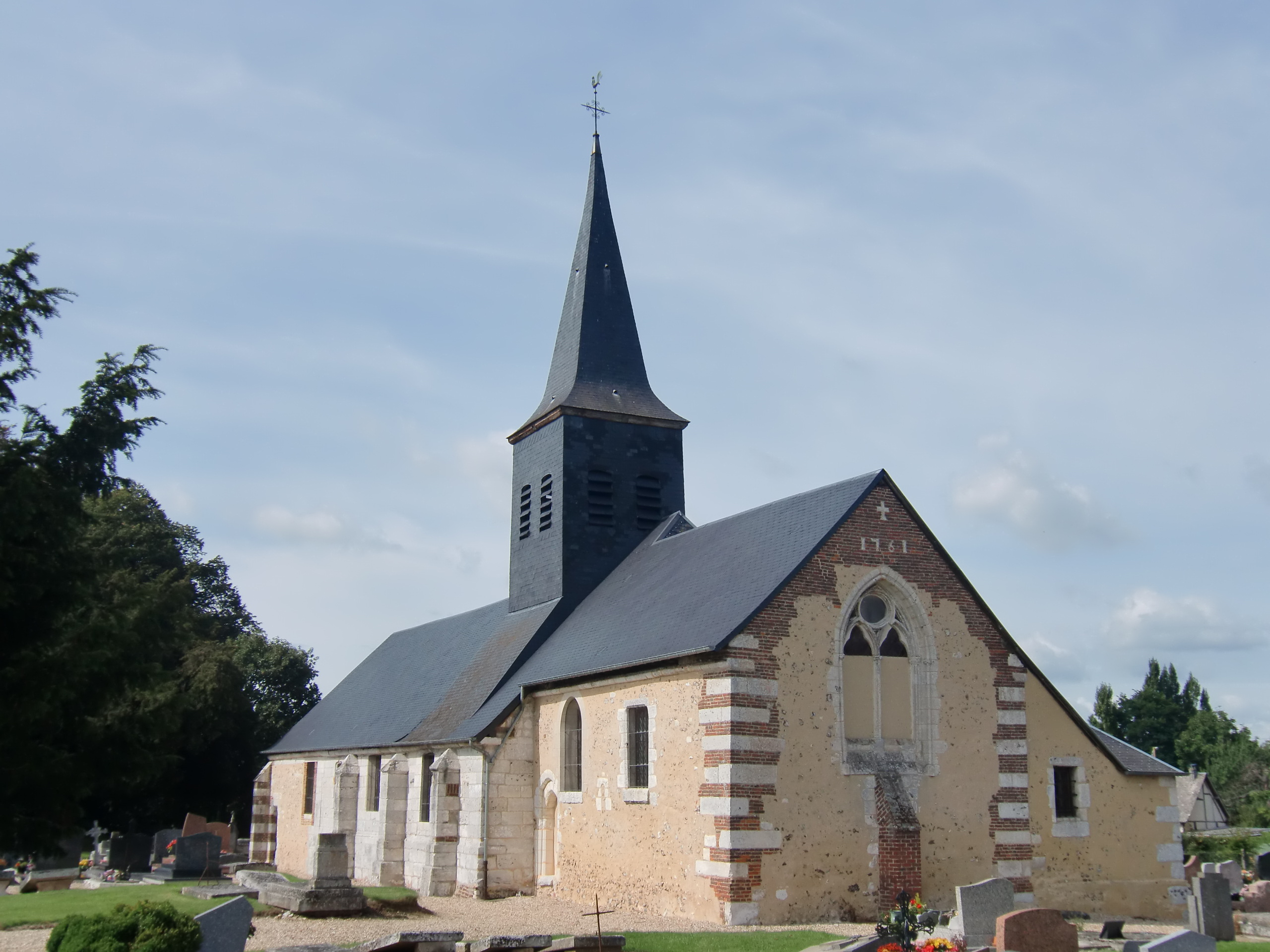 église de Barneville-sur-Seine (Eure, Normandie, France)